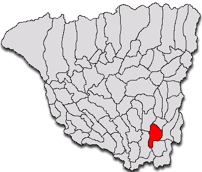 Categorie:Hărţi ale judeţului Gorj